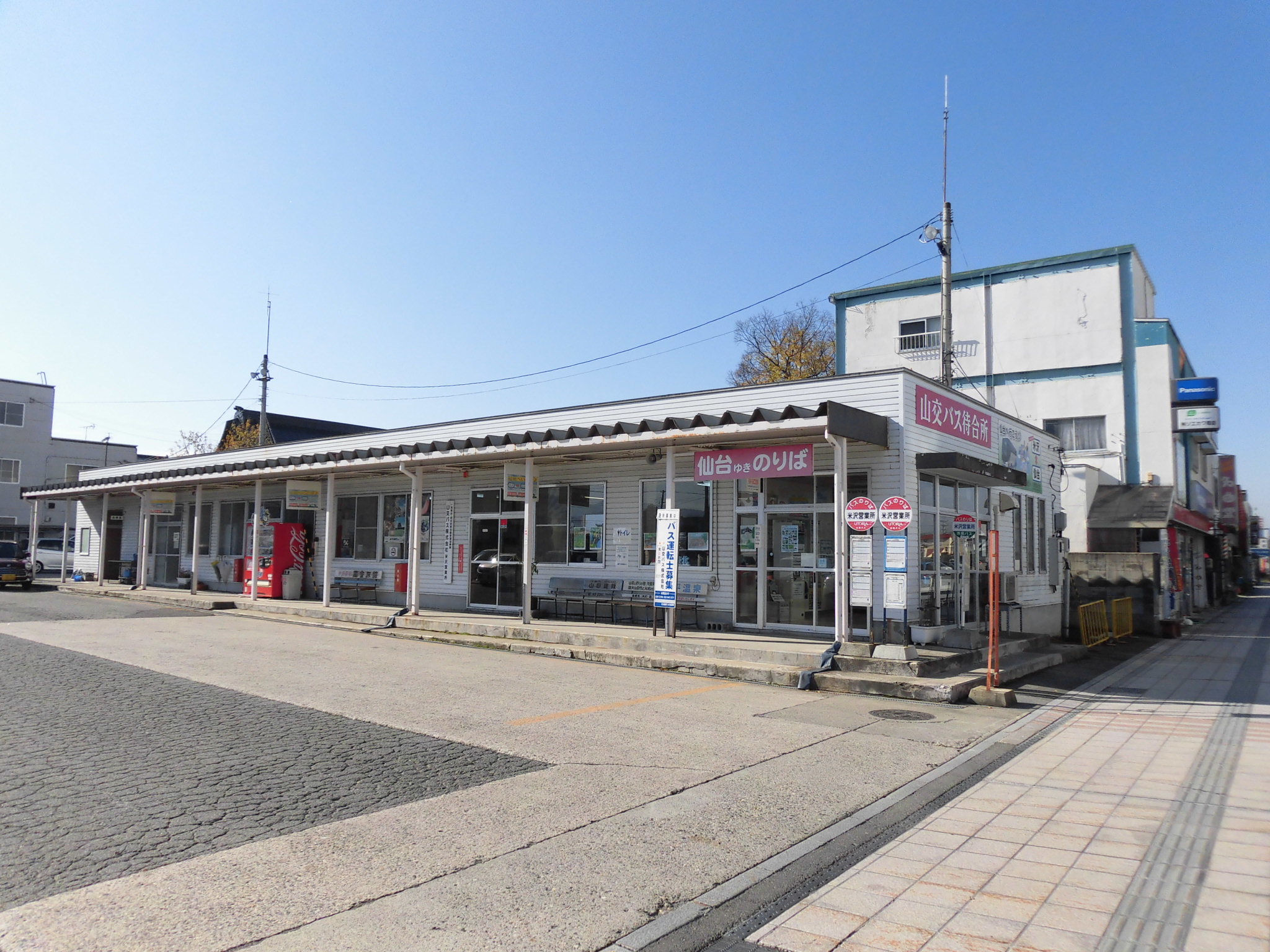 山交バス米沢営業所。山形県米沢市。